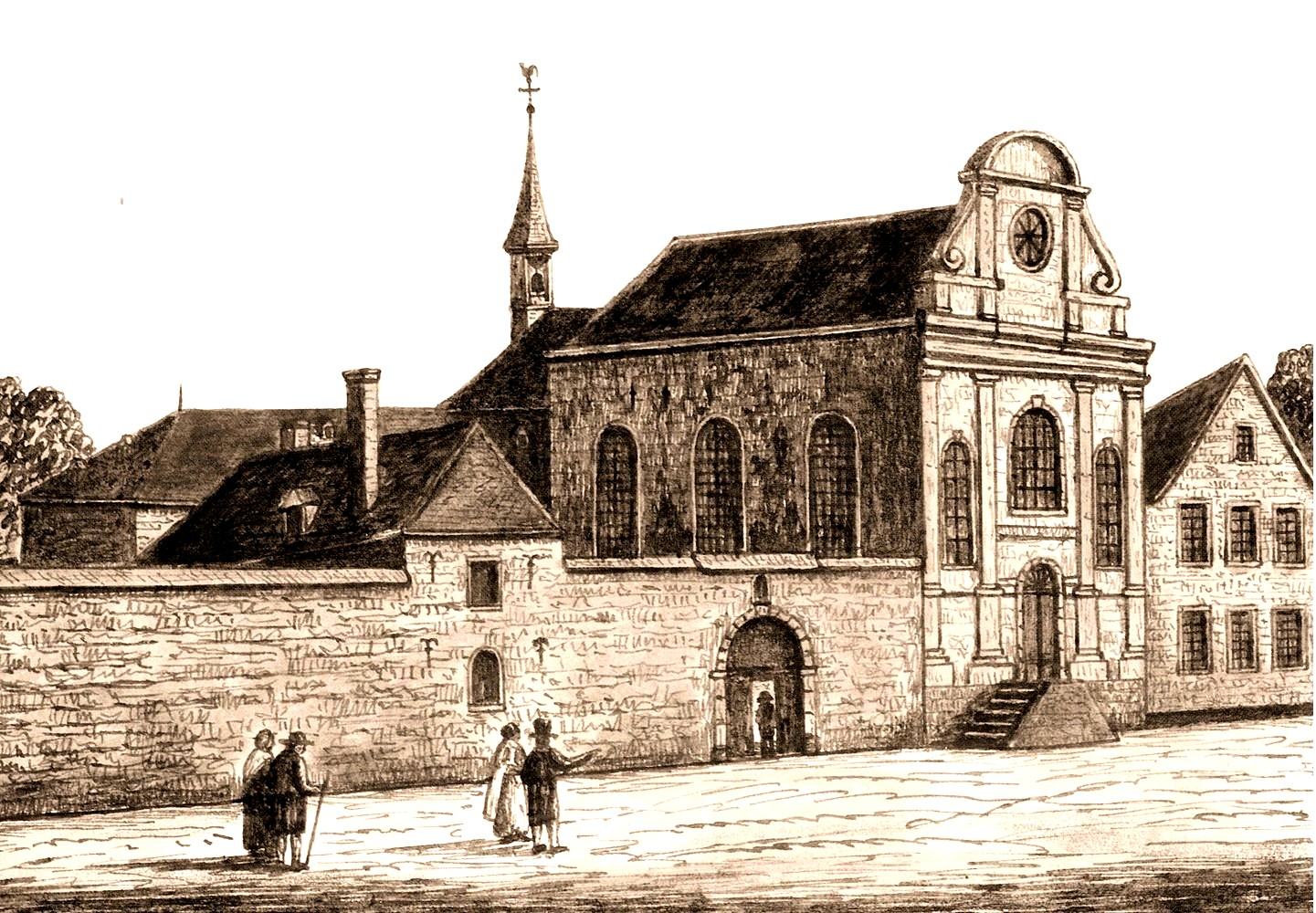 Ansicht der Theresienkirche und des Karmelitinnenklosters in der Aachener Pontstraße nach einem Gemälde von J. P. Scheuren